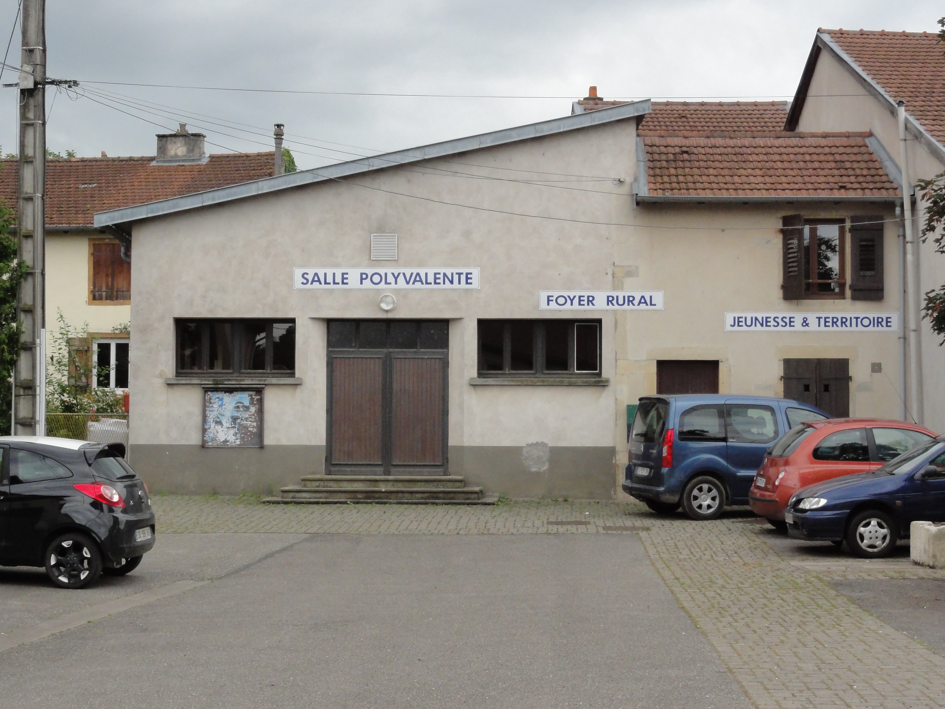 Vélaine-sous-Amance (M-et-M) salle polyvalente, foyer rural, jeunesse et territoire